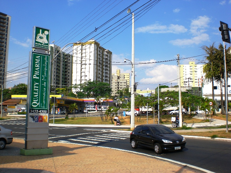 Rotatória da Av. Independência